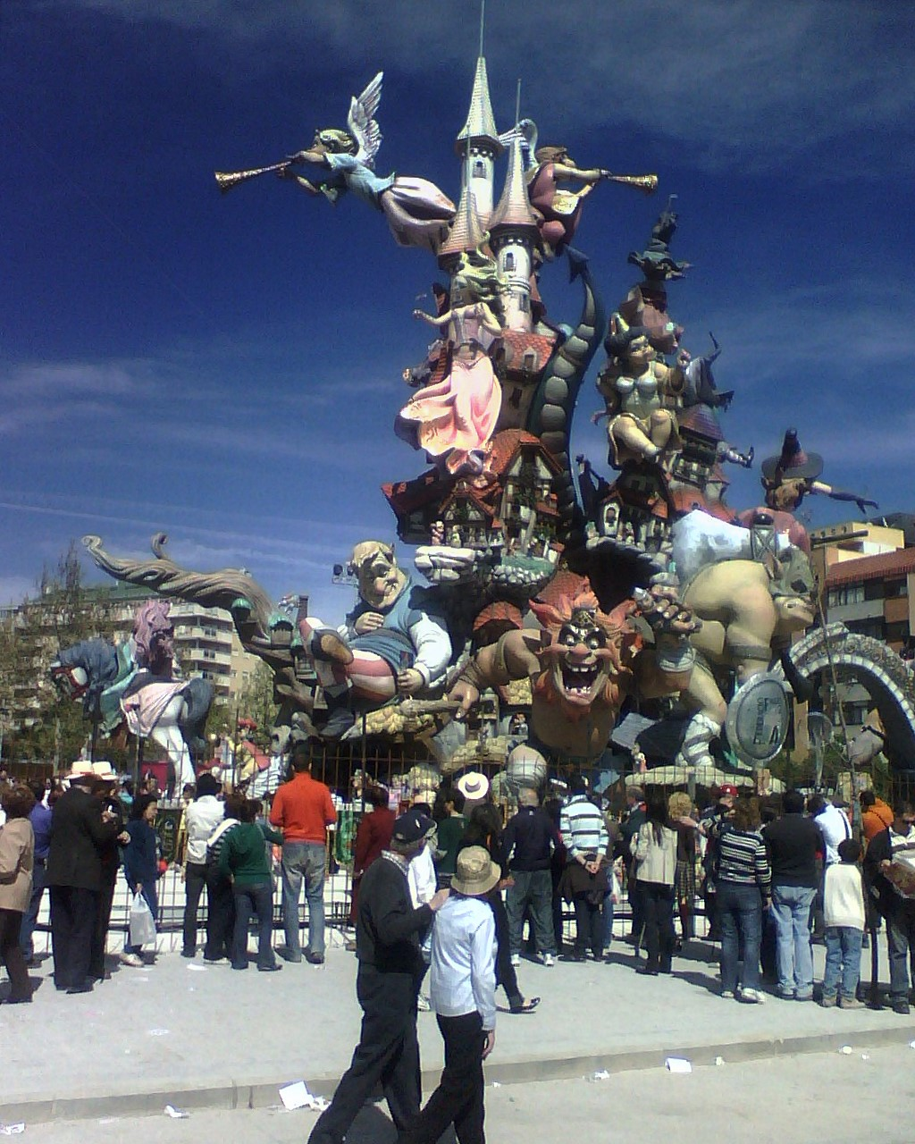 Monumento de la Falla de Nou Campanar. 2008